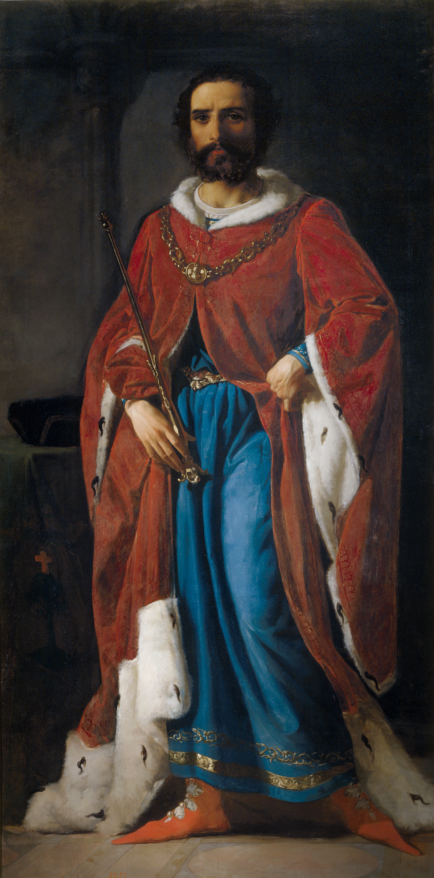 Retrato imaginario de García Aznar († 922), V conde de Aragón e hijo del conde Aznar II Galíndez, a quien sucedió como conde de Aragón.